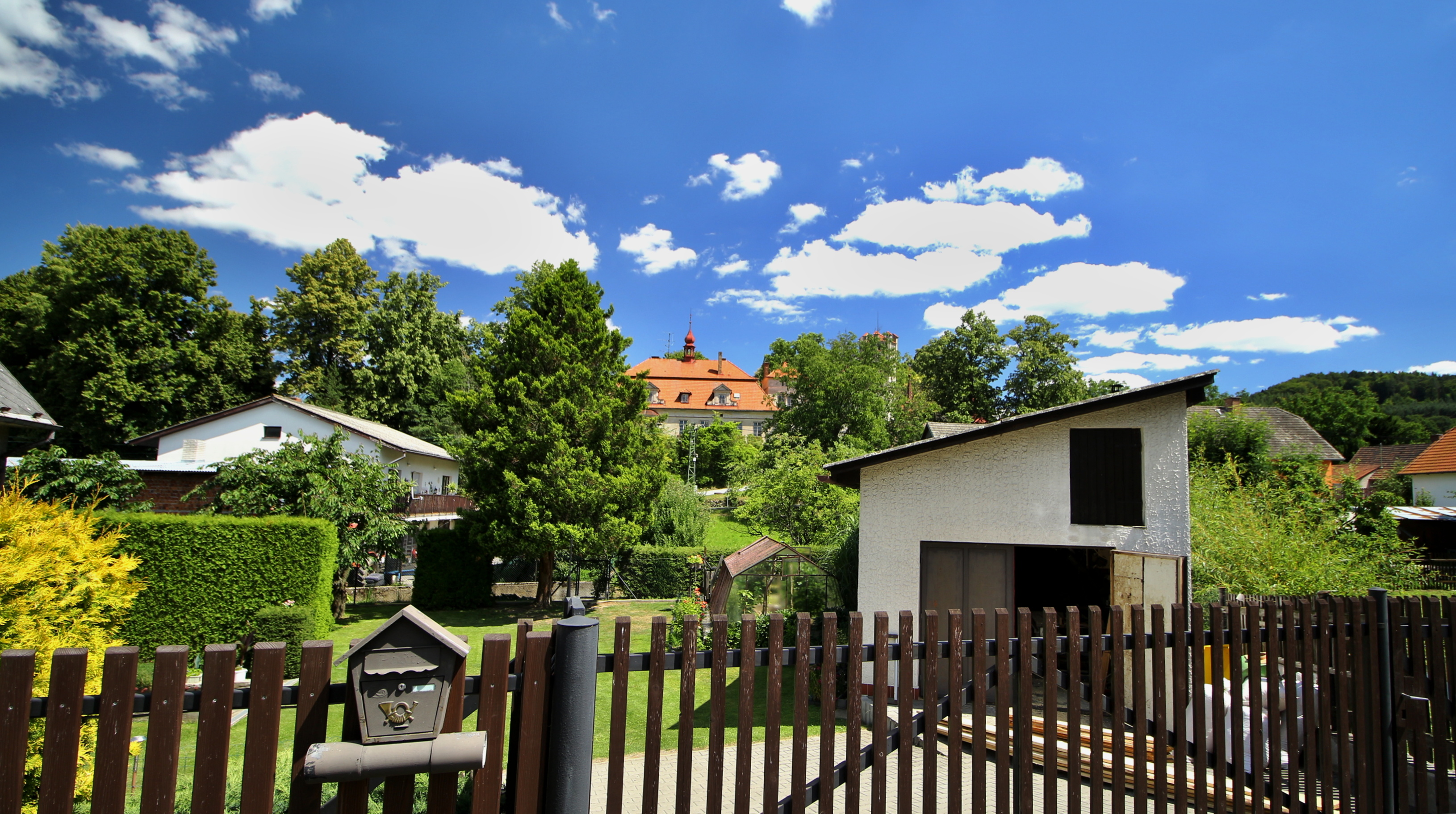 Jetřichovice